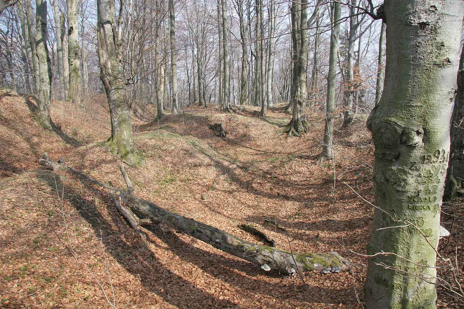 Zřícenina hradu Žampach - předhradí autor:Zp